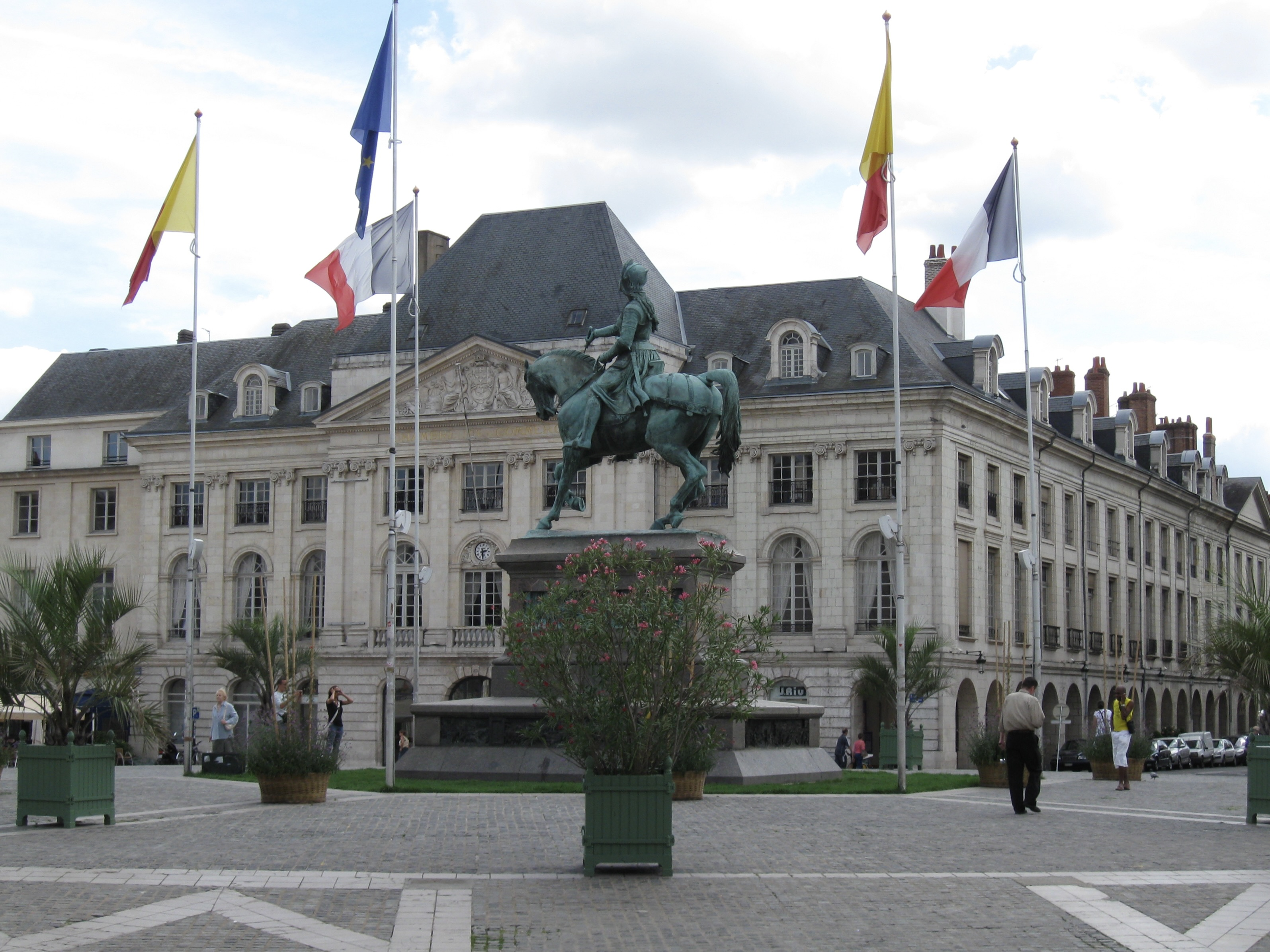 Place du Martroi, Orléans, Loiret, France